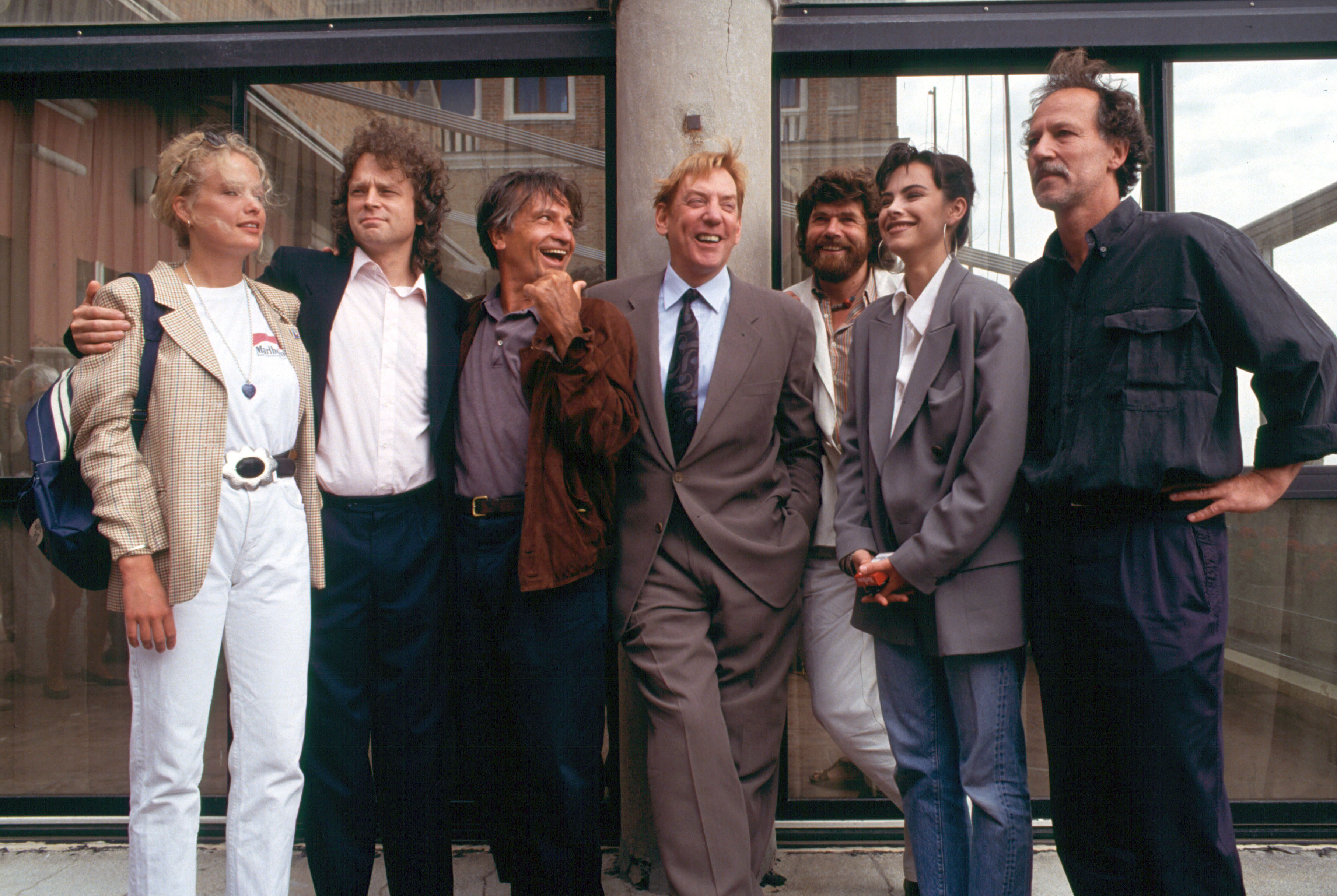 Presentazione del film di Werner Herzog Grido di pietra al 48ª Mostra internazionale d'arte cinematografica di Venezia.